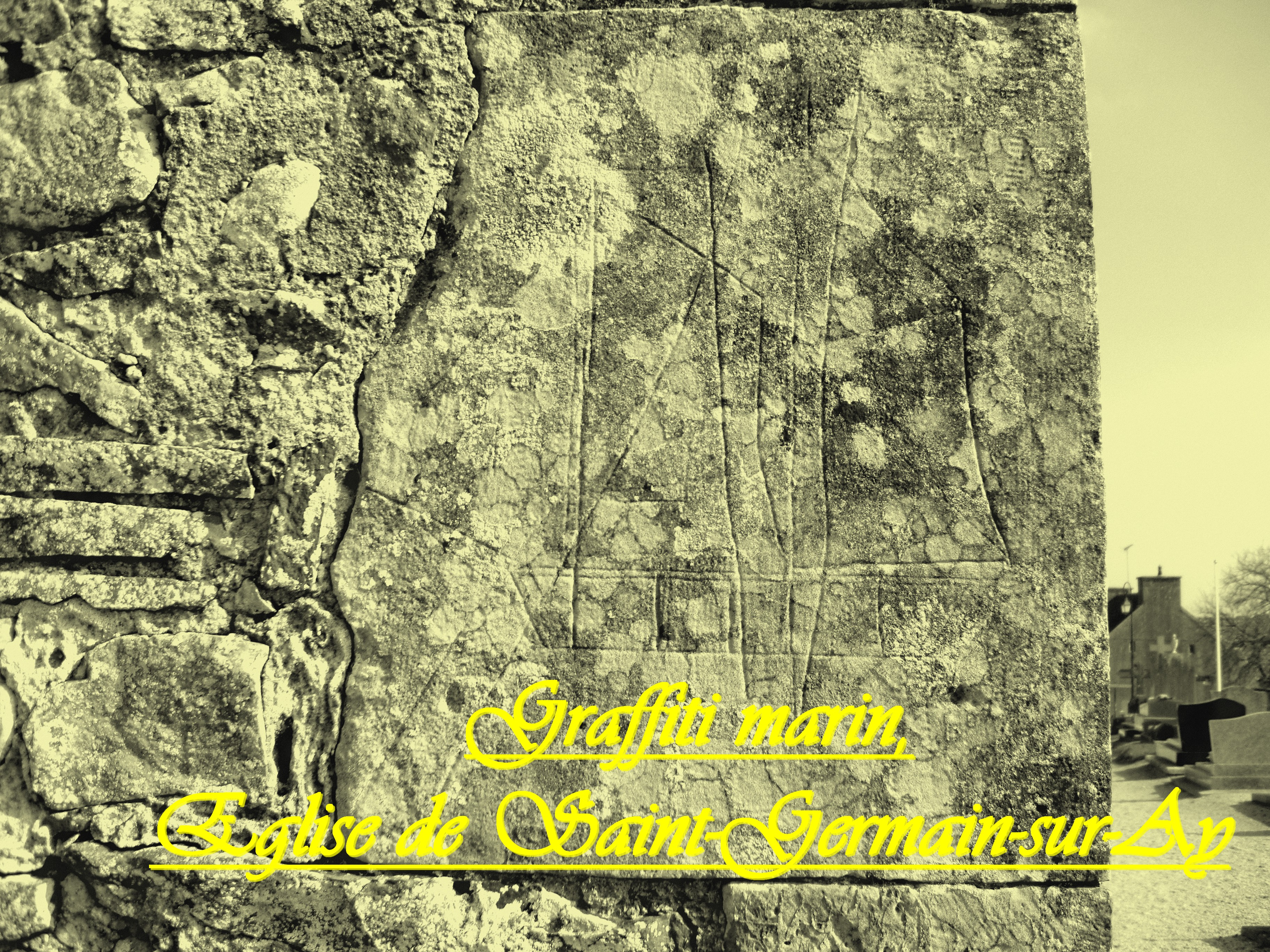 Graffiti marin ex-voto Eglise de Saint-Germain-sur-Ay